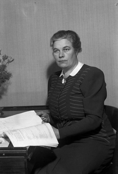 Stortingsrepresentant Claudia Olsen